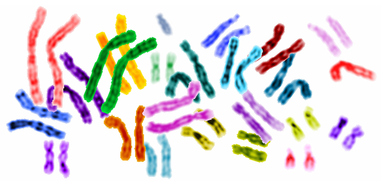 Human genome